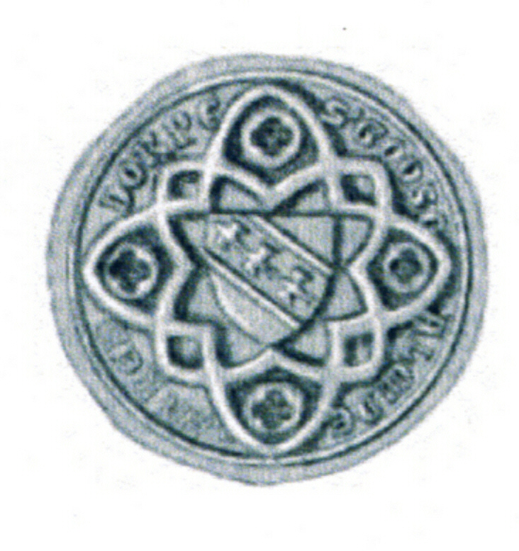 Siegel des Ratsmannes Godscalus de Warendorpe. Das Siegel stammt aus der Zeit um 1346. Siehe Emil Ferdinand Fehling: Lübeckische Ratslinie, Nr. 356 (Gottschalk Warendorp).